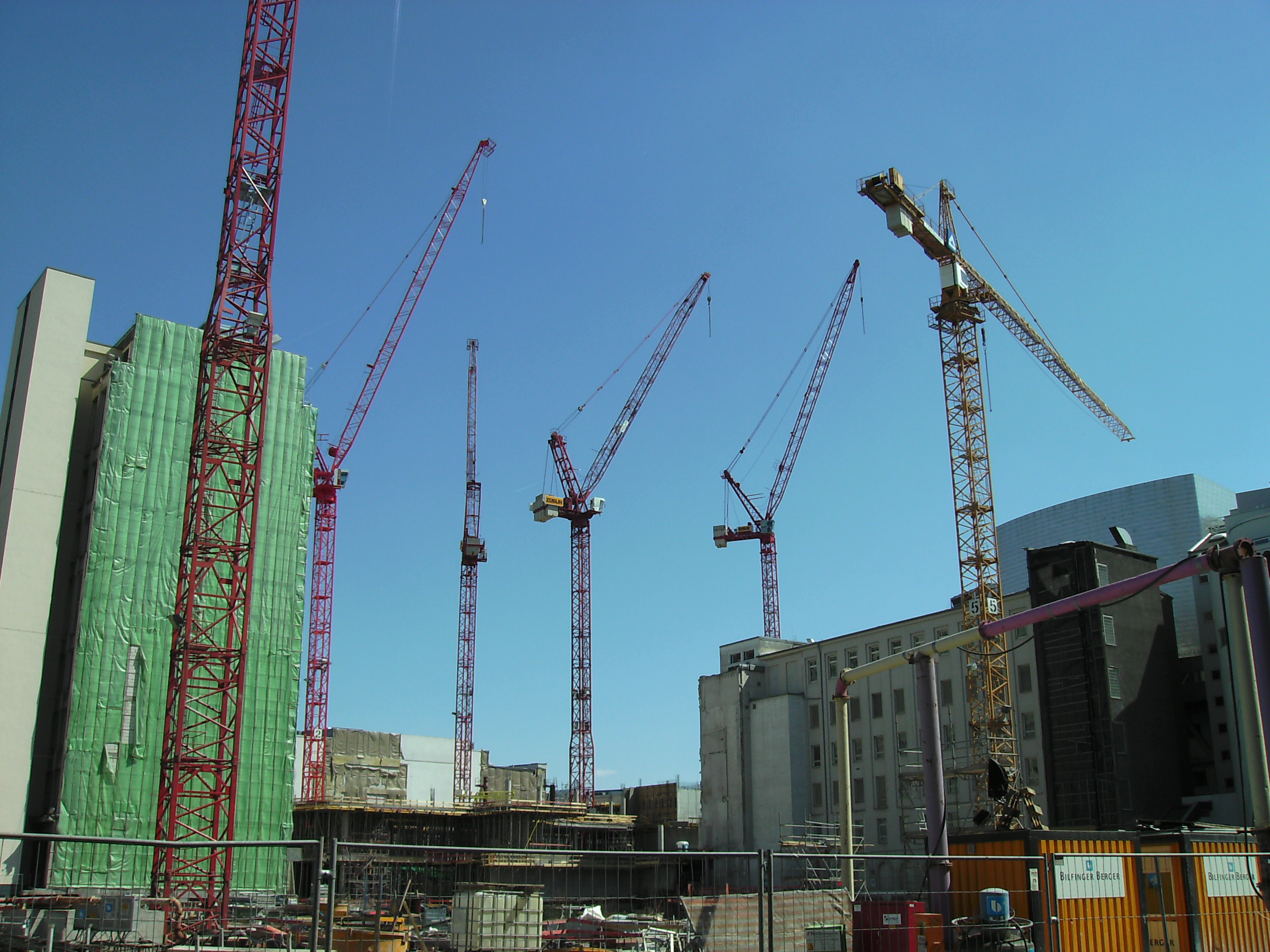 Grossbaustelle "Frankfurt HochVier" (Mai 2007)